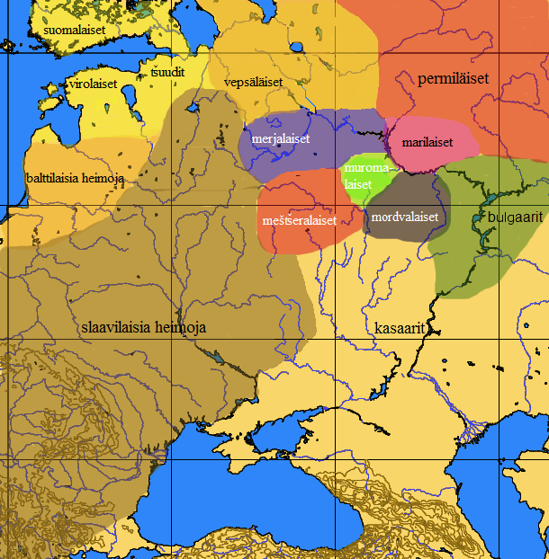 Permiläisten kielten levinneisyys 1000‐luvulla (suomennettu).